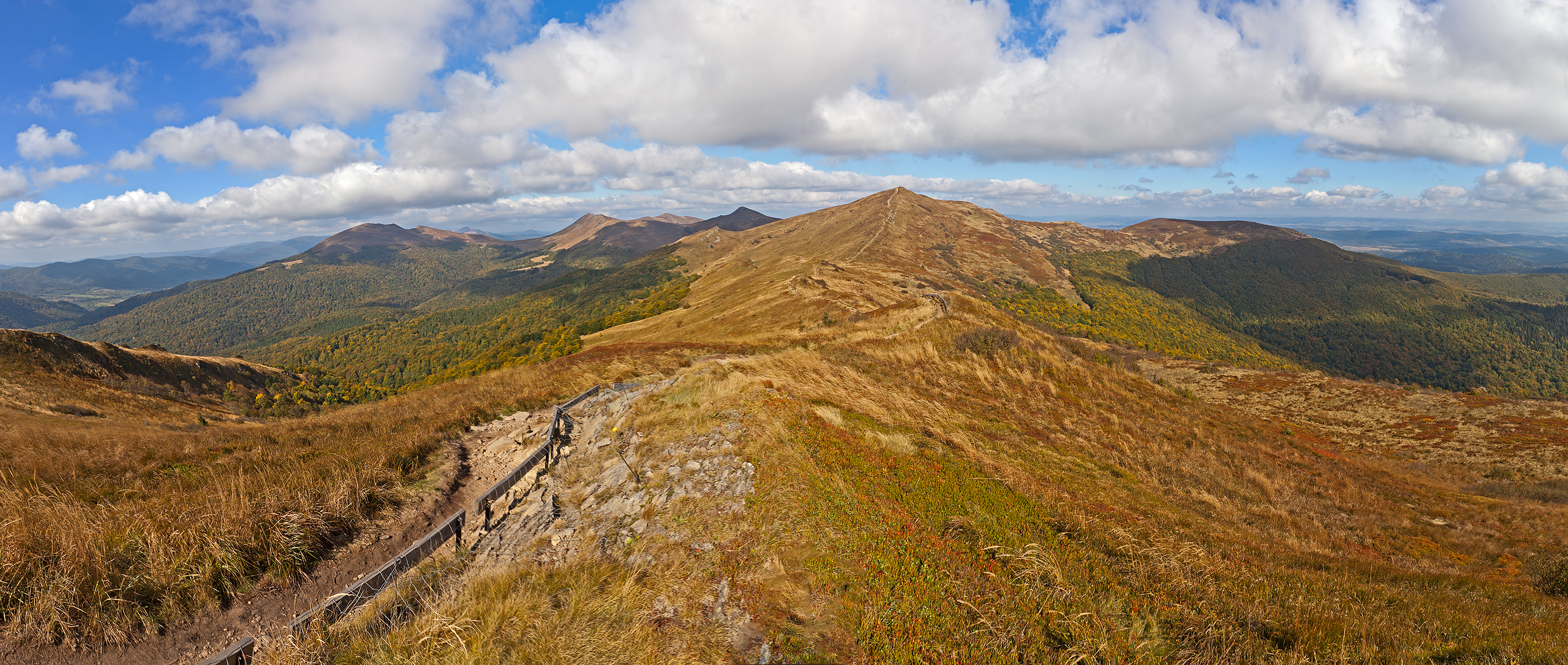 Widok ) z Rozsypańca na Halicz (środek ekranu) oraz Tarnicę (po lewej)